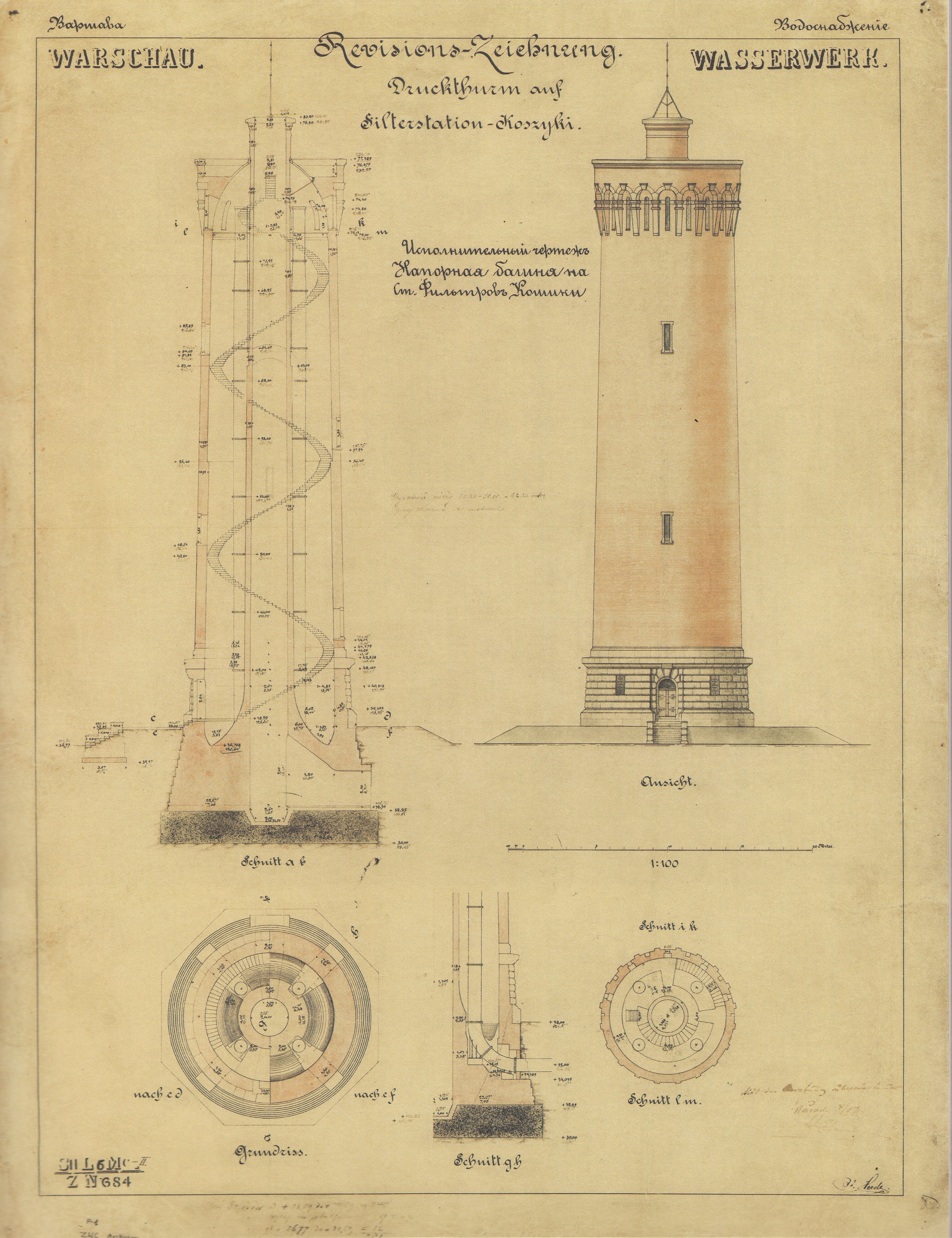 Projekt wieży ciśnień w Zespole Stacji Filtrów w Warszawie